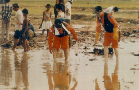 970903중앙119구조본부 베트남 항공 815편 추락 사고 출동